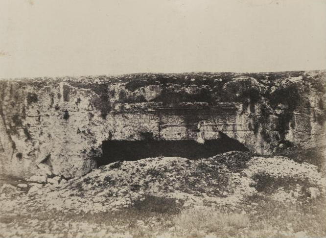 Tombeau des rois de Juda, intérieu - Jerusalem.